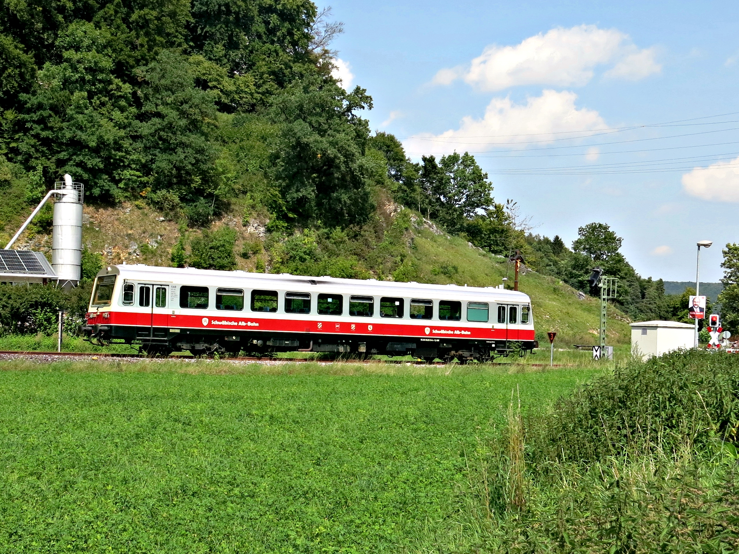 Triebwagen-Baureihe NE81 hat die B 492 überquert und biegt in das Schmiechtal